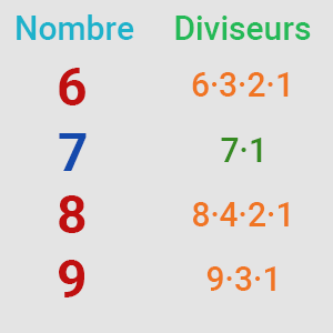 Mise à jour de l'image pour la rendre plus compréhensible.